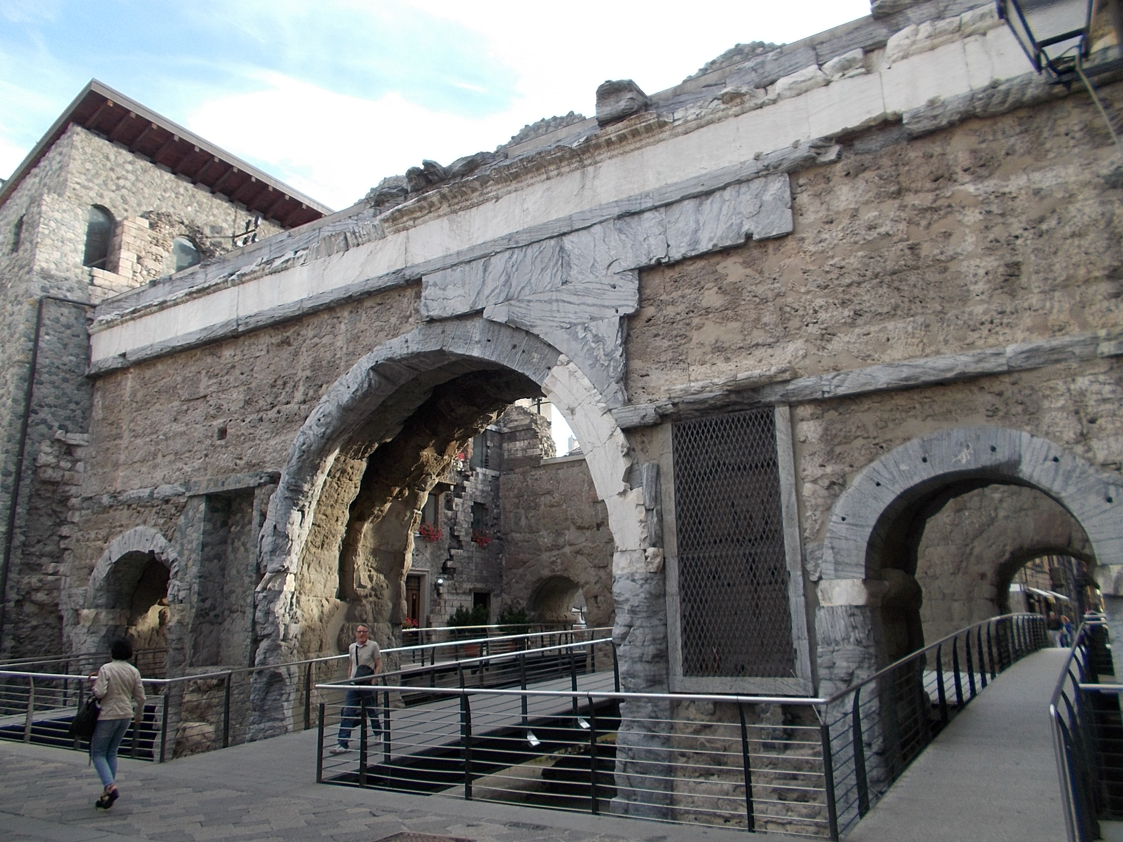 Porta pretoria Aosta This is a photo of a monument which is part of cultural heritage of Italy.